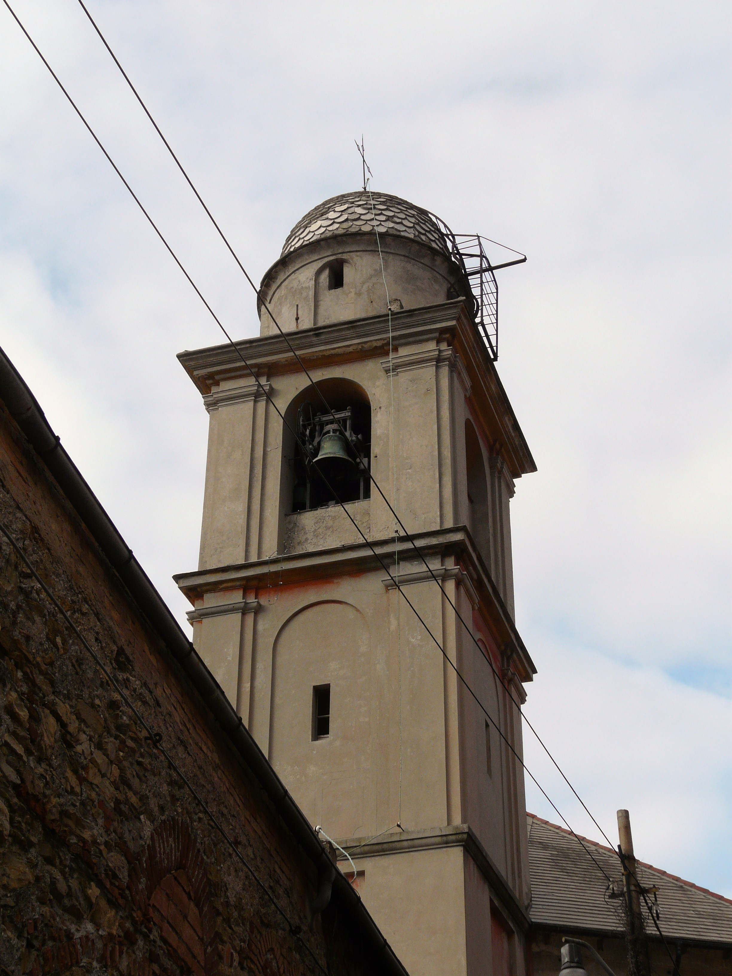 Campanile della chiesa di San Gerolamo, Quarto dei Mille, Genova, Liguria, Italia